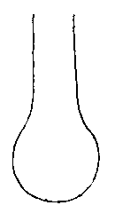 fungi stem